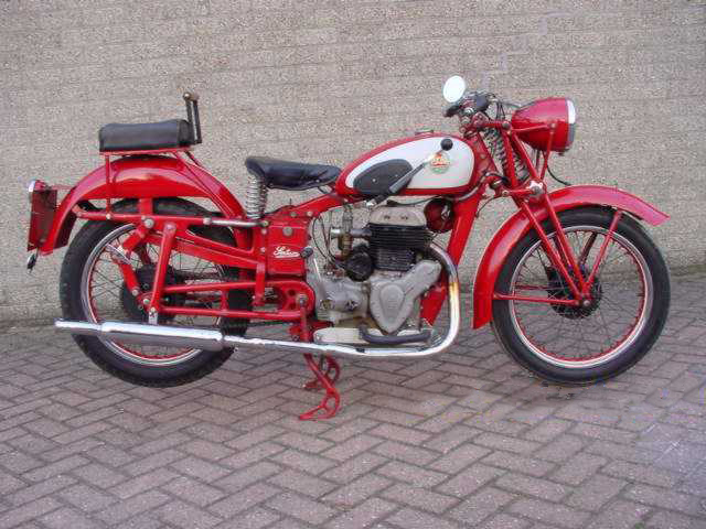 Toestemming van Yesterdays Antique Motorcycles